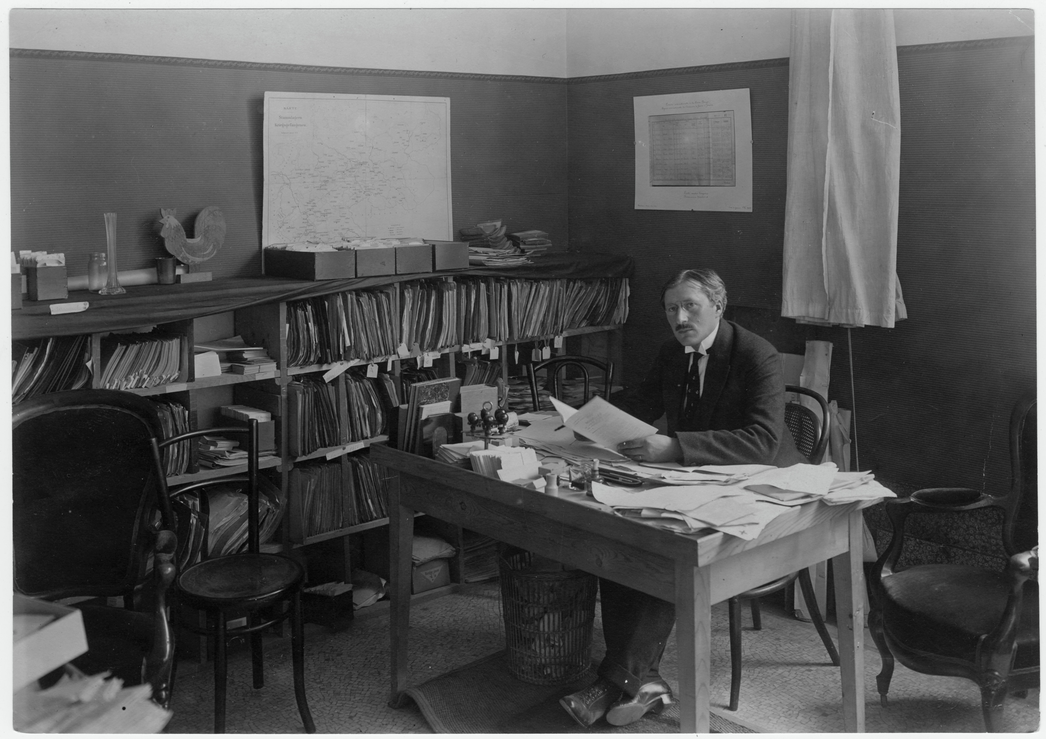 Guerre 1914-1918. Genève, Musée Rath, Agence internationale des prisonniers de guerre. M. Clouzot, rédacteur des Nouvelles de l'Agence internationale des prisonniers de guerre, bulletin cére en 1916.